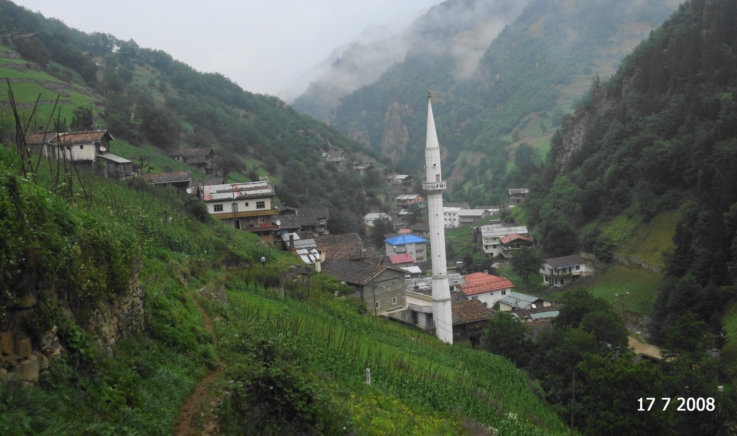 Uzuntarla Köyü Ahmaklidan